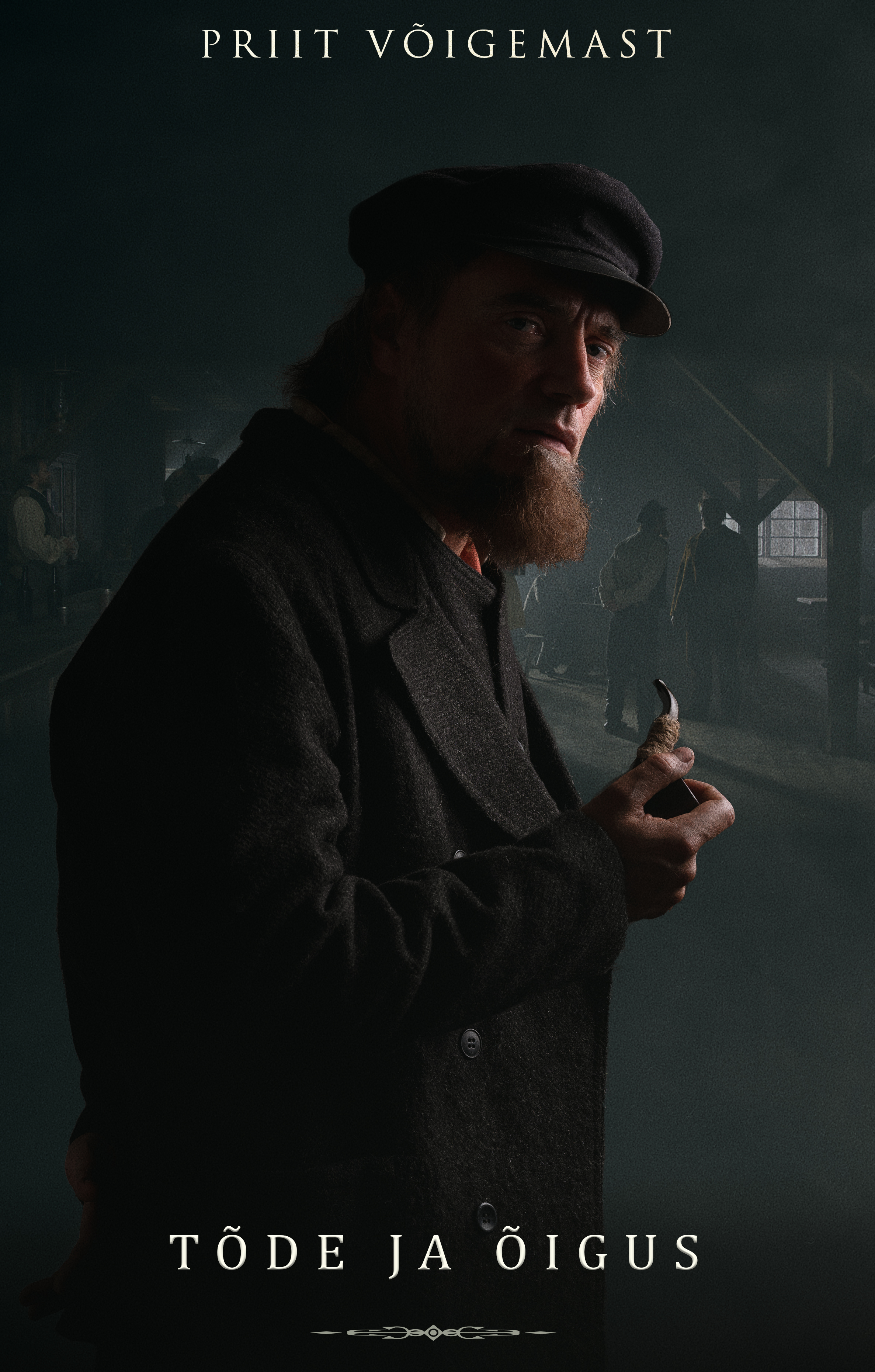 Priit Võigemast filmis "Tõde ja õigus" Pearu osatäitjana